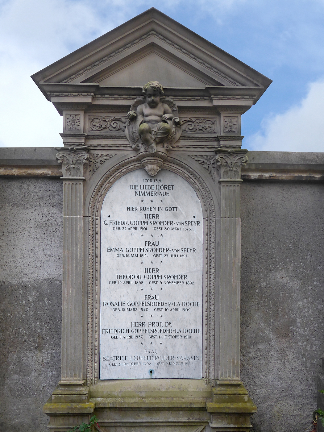 Friedrich Goppelsröder-La Roche (1837–1919) Chemiker, Professor. Doktor in Chemie, Physik und Mineralogie. Privatdozent an der Uni Basel.